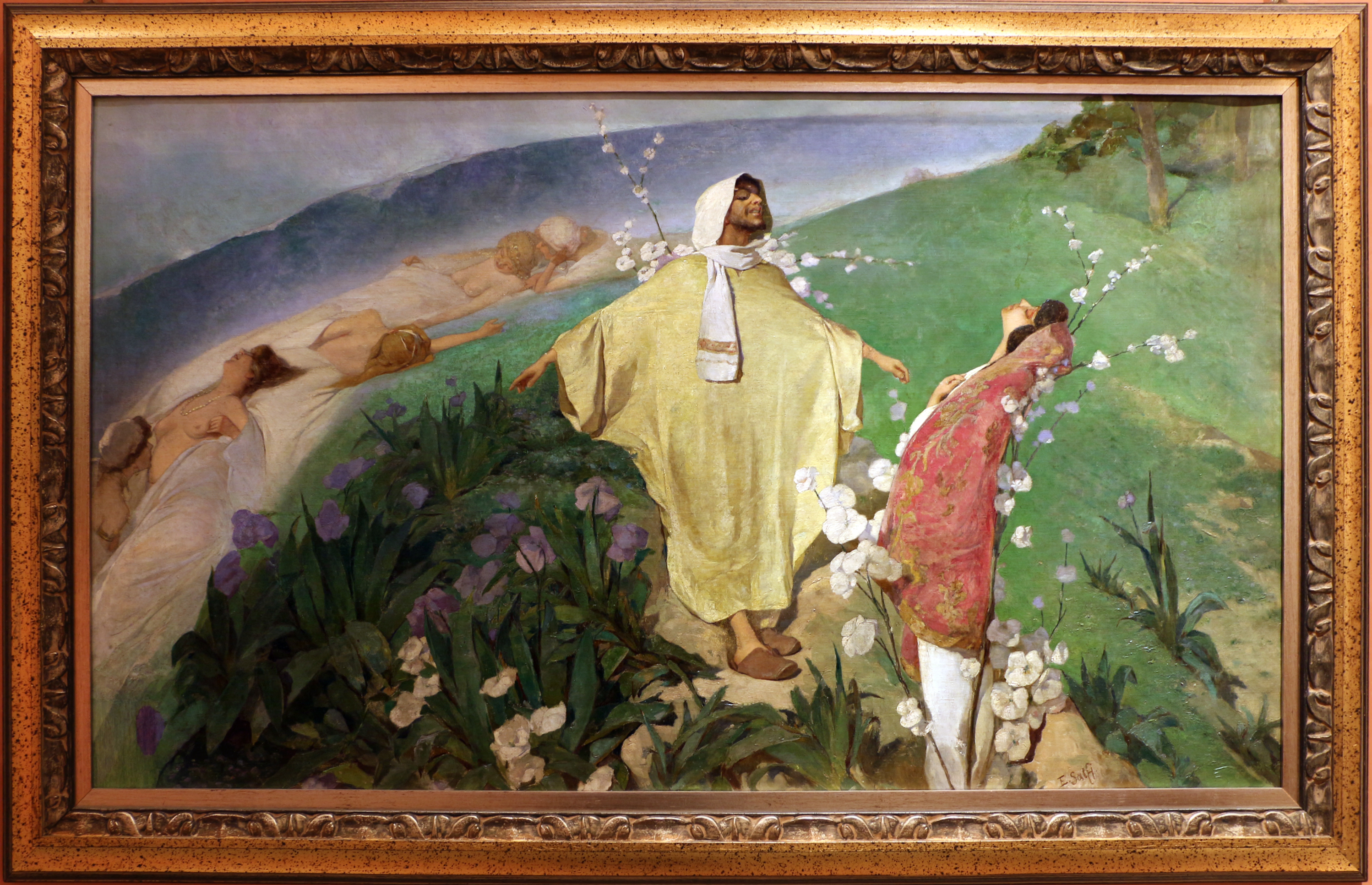 Pinacoteca civica di Reggio Calabria - paintings This is a photo of a monument which is part of cultural heritage of Italy.